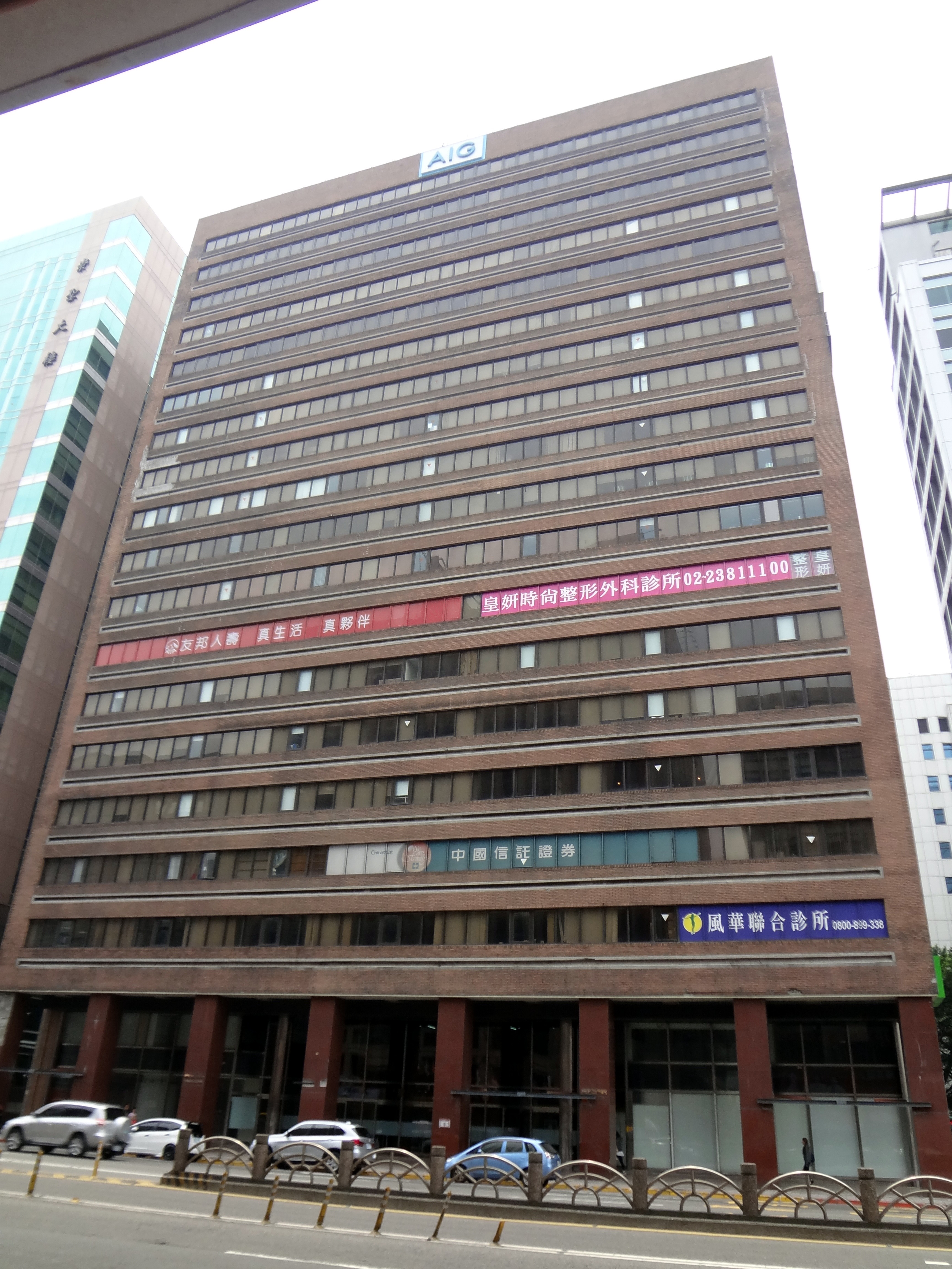 中央保險大樓，位於臺灣臺北市中正區忠孝西路一段6號。